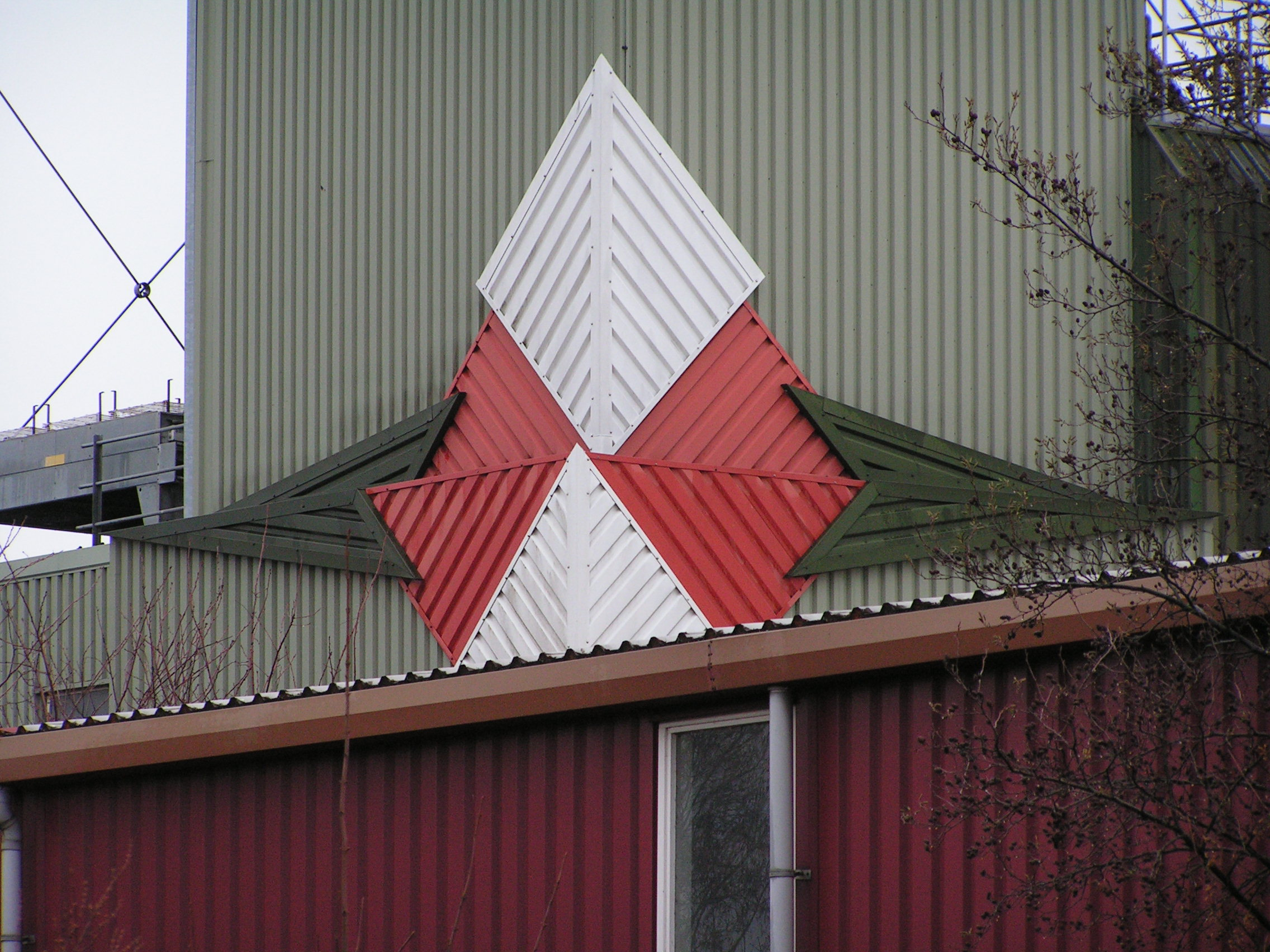 Kunstobject op sproeitoren bij Croda (voormalige kaarsenfabriek) te Gouda